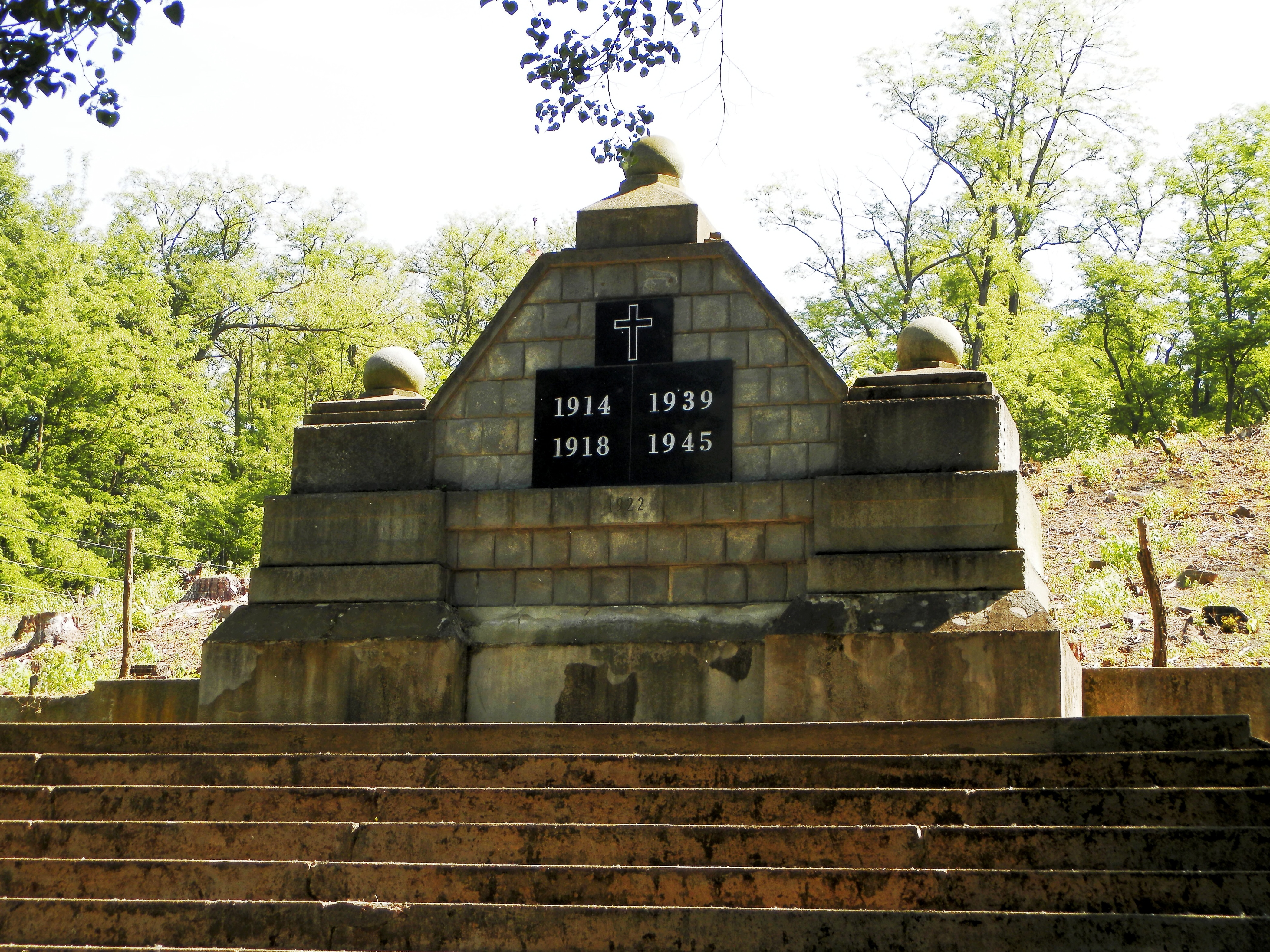 Pomník padlým I. světové války (Lechovice), Lechovice